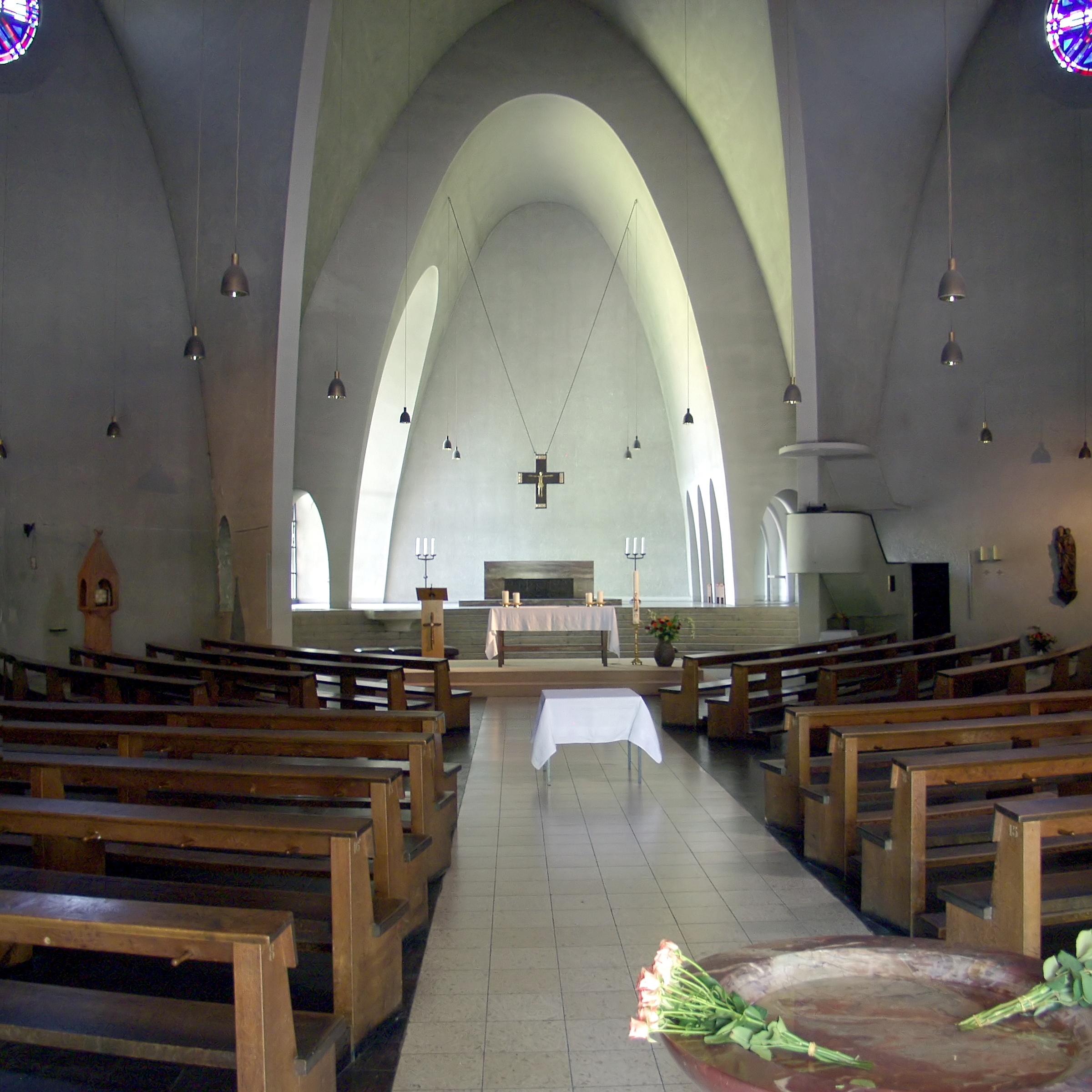 Innenraum von St. Engelbert, Köln